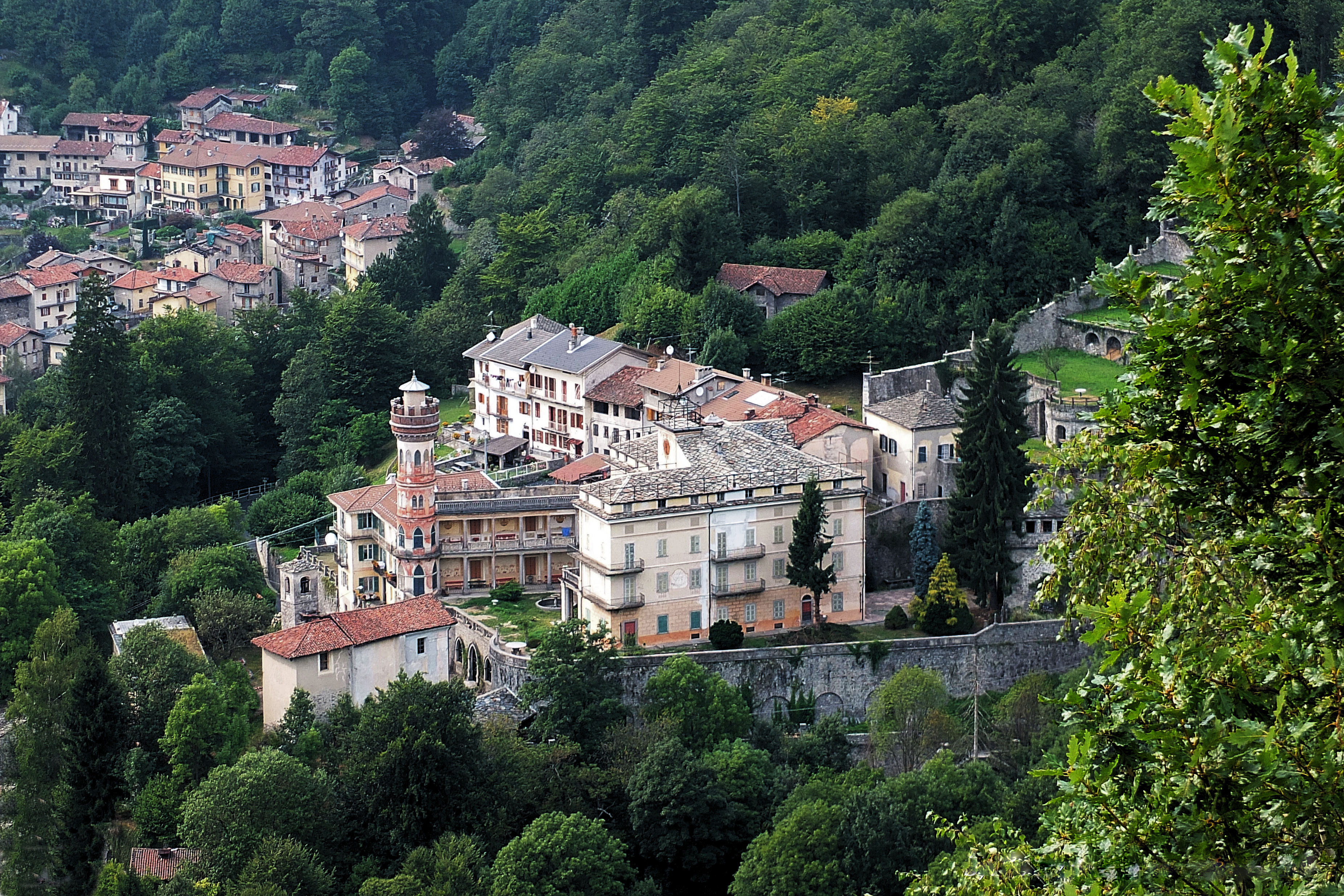 Saluti da Villa Piatti a Roreto nel paese di Quittengo sito nella valle del Cervo in Biella perla del Piemonte.